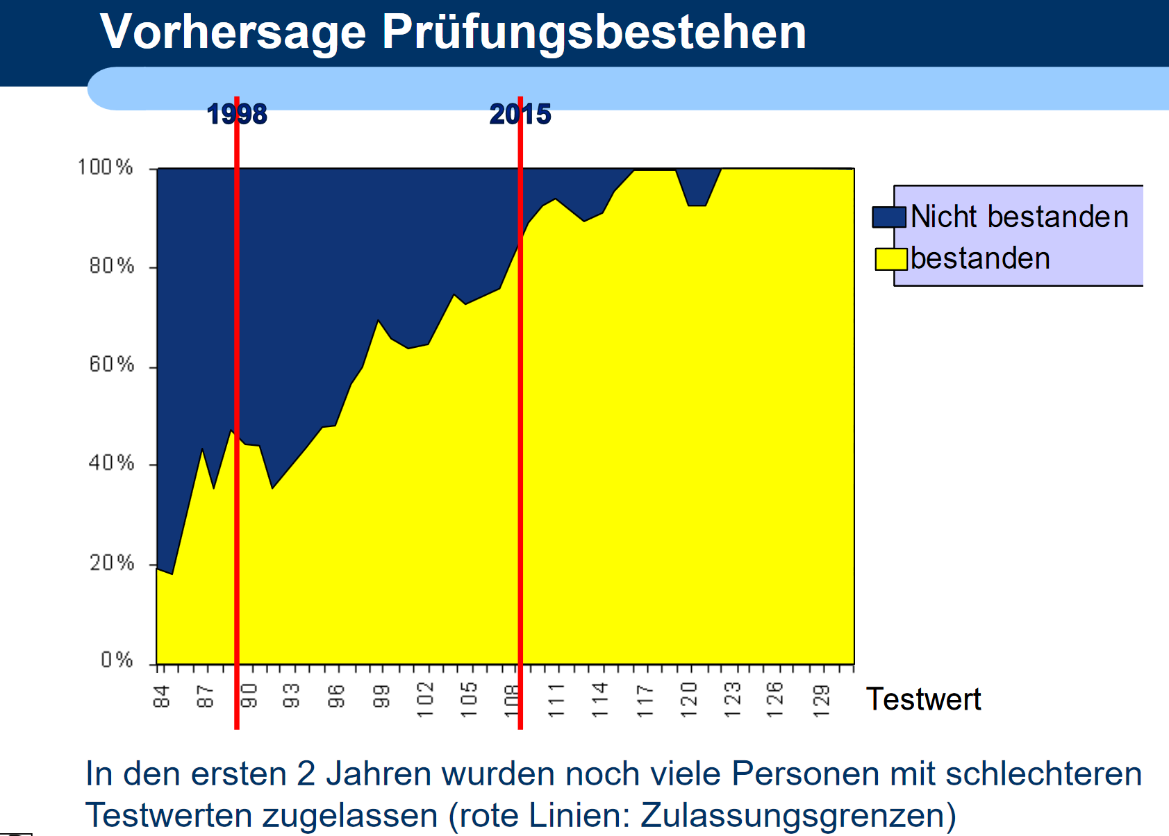 EMS Schweiz: Prüfungsbestehen und EMS-Testergebnis, Wahrscheinlichkeit des Bestehens der 1. Vorprüfung pro Testwert für Kohorte 1998 nach 2 Jahren, n=567